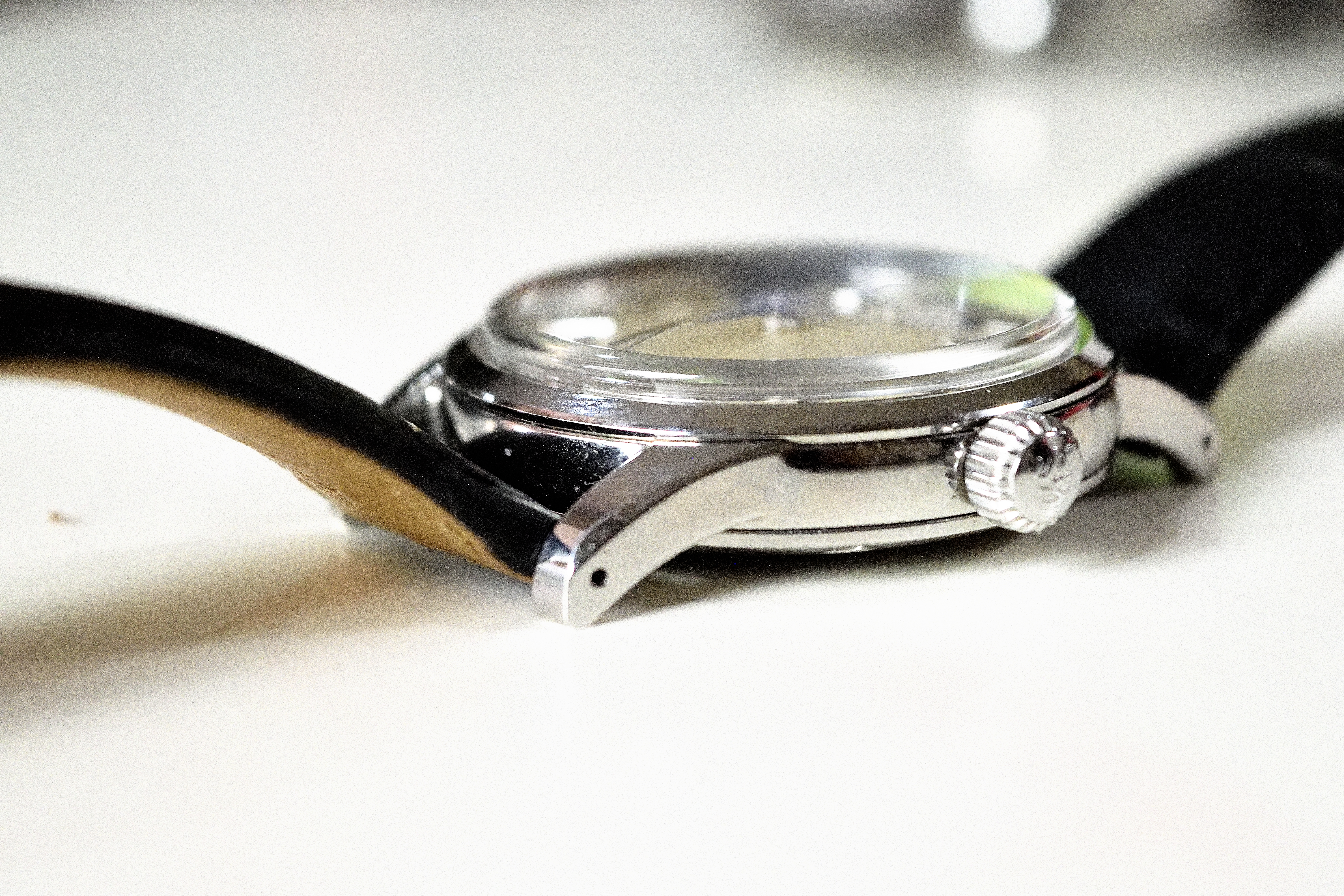 ＳＢＧＷ２３１ 側面図